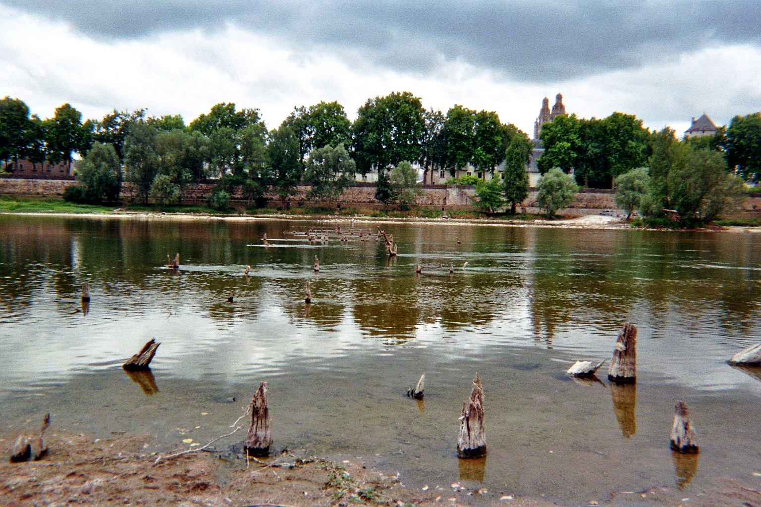 Vestiges du pont du Bas Empire de Caesarodunum (Civitas Turonorum)